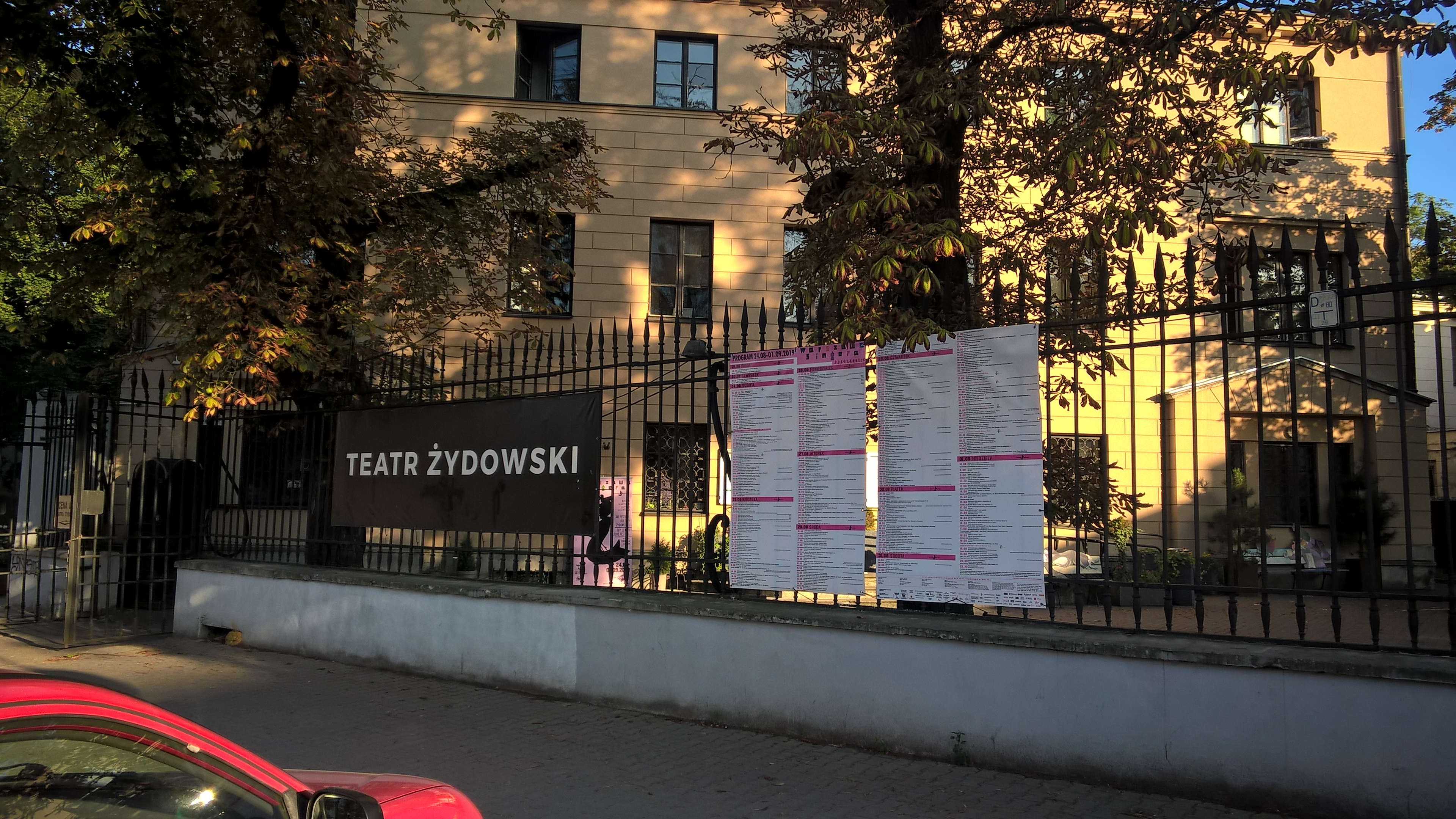 Théâtre juif de Varsovie, 35 rue Senatorska (août 2019)